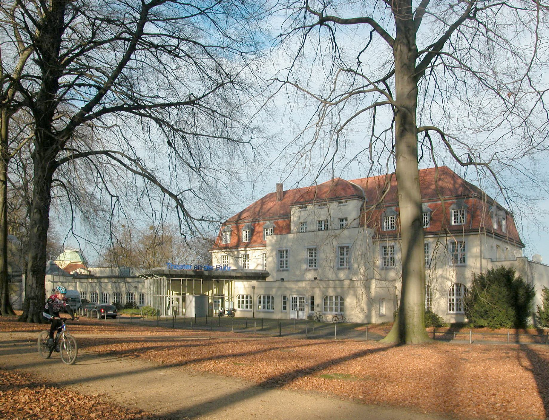 Theater an der Ruhr im Raffelbergpark Objekt: 51°26′19.42″N 6°49′23.16″E / 51.4387278°N 6.8231°E Kamera-Position:Parkstraße